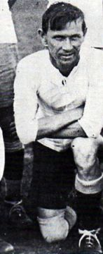 Ennis Hayes con la casaca de la selección Argentina